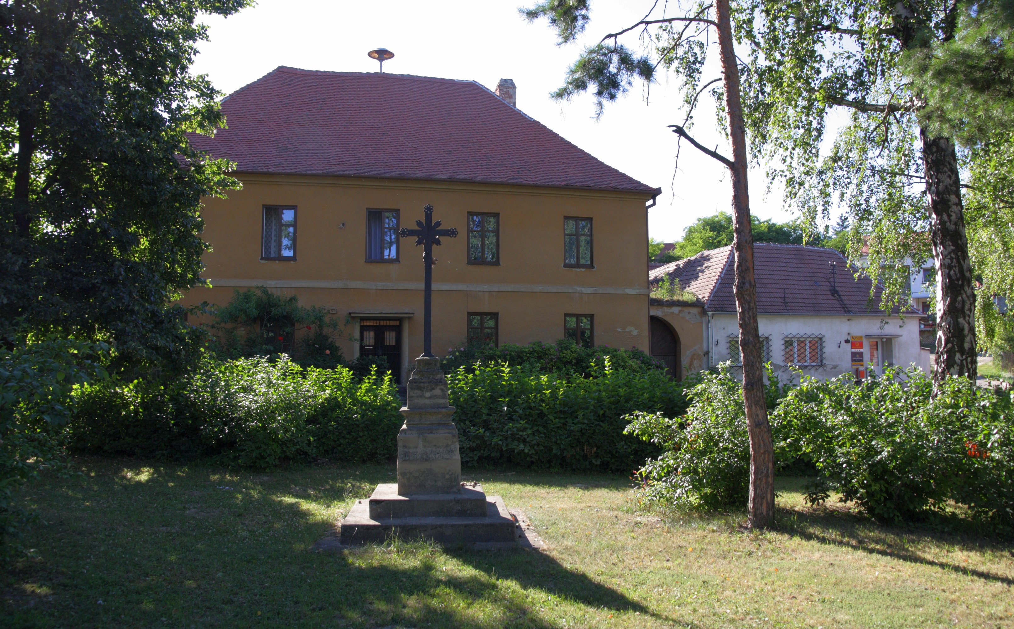 Borkovany - fara a pošta.